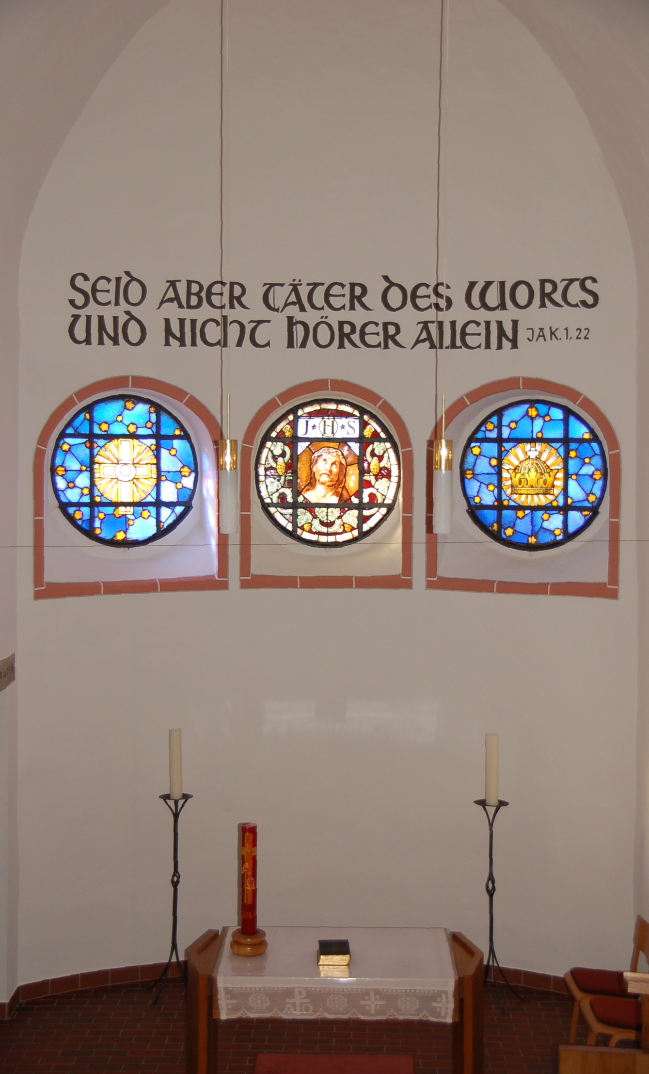 Kirche Woppenroth: Altarraum